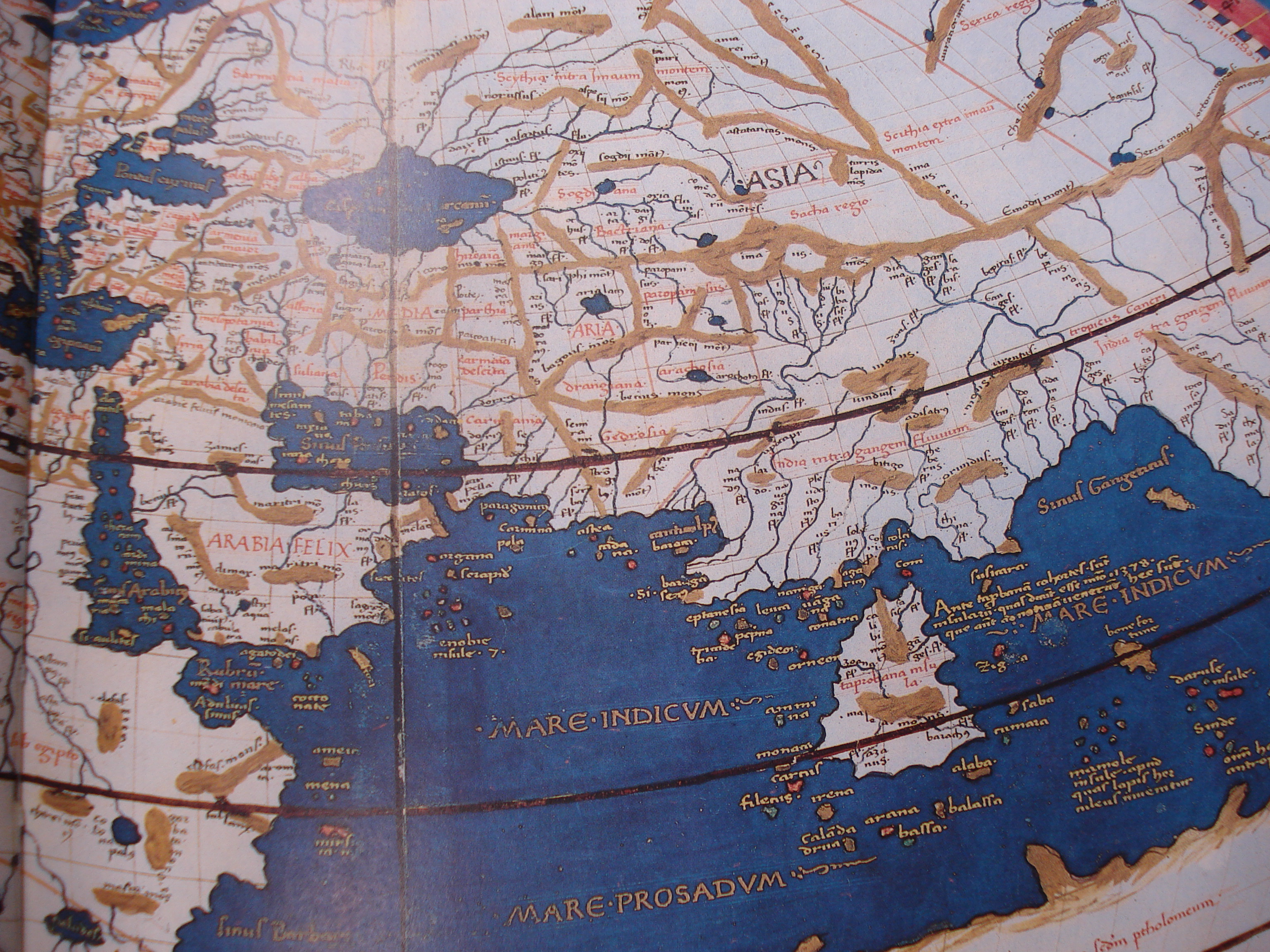 خرائط تاريخية قديمة مصدر: مخازن مكتبة جامعة بريمين تاريخ: خرائط تعود للقرون الرابع عشر إلى أوائل القرن العشرين نوع: تصوير كاميرا رقمي